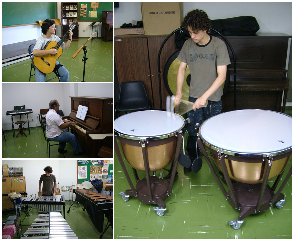 Artes, Filosofia e Ciências Sociais